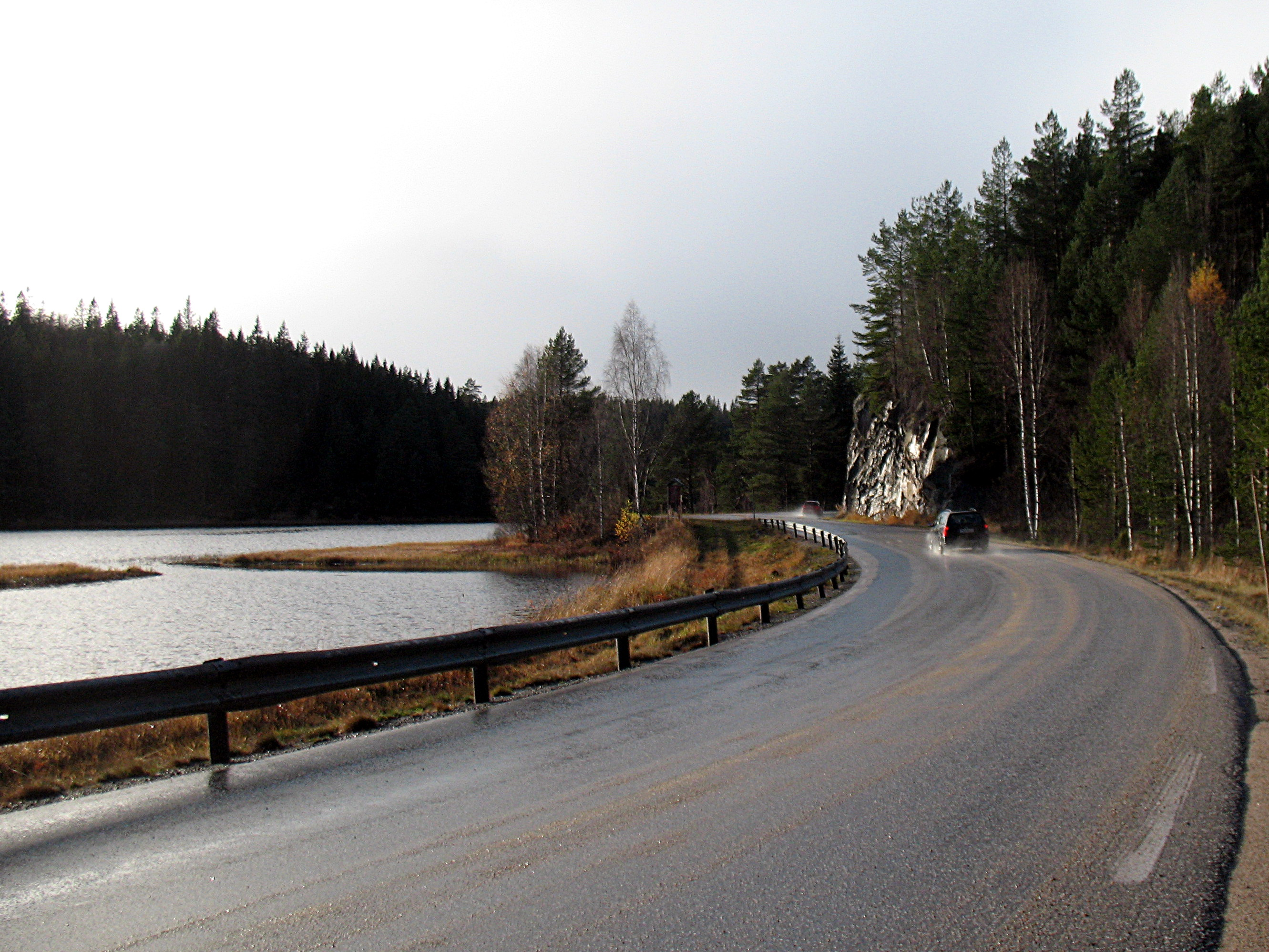 Fylkesvei 454 i Vennesla kommune, Vest-Agder ved Kjåvann.